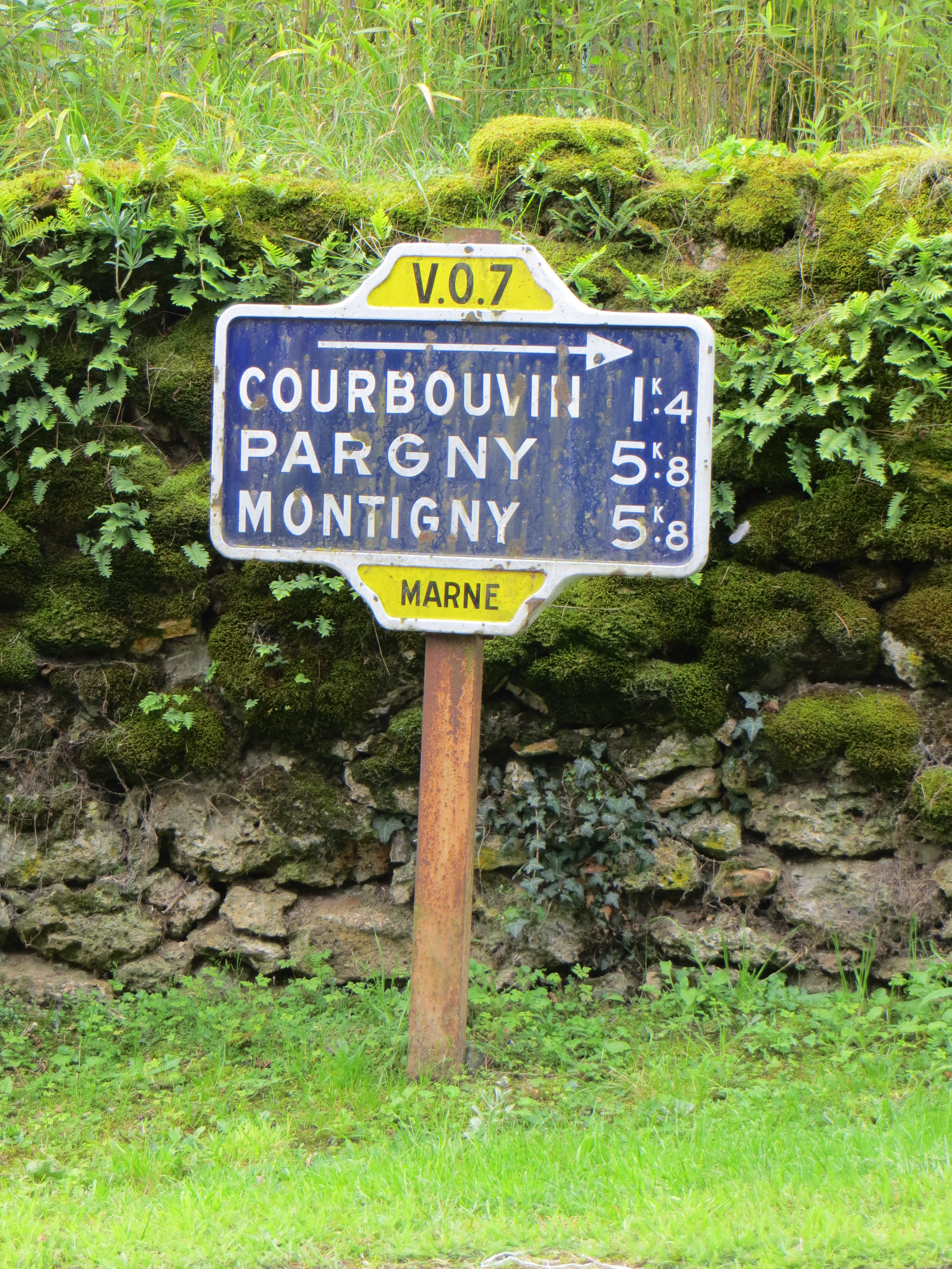 Panneau indicateur Dunlop